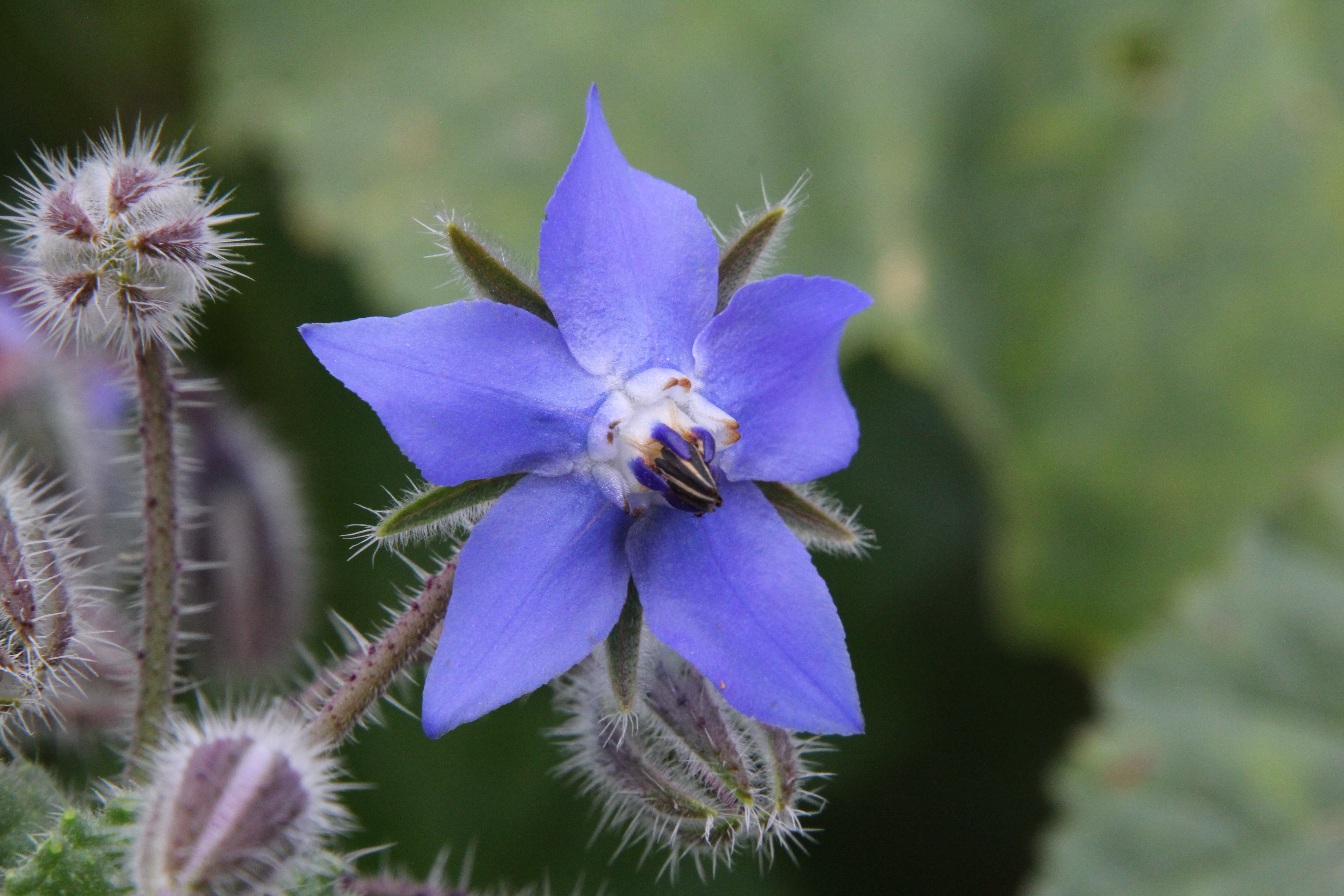 Flora della Sardegna